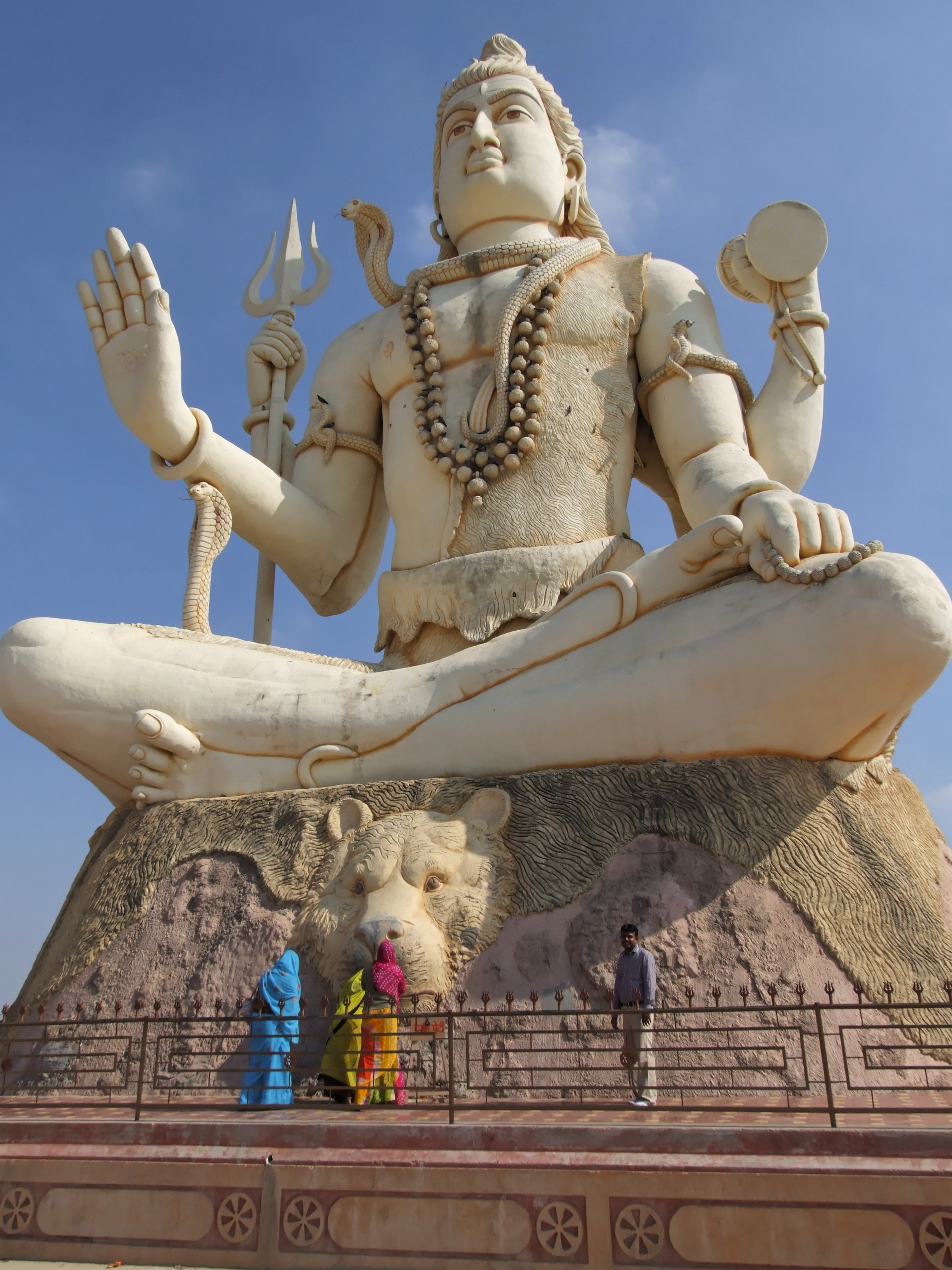 Nageshwar Mahadev, Shiva Temple, Gujarat - India